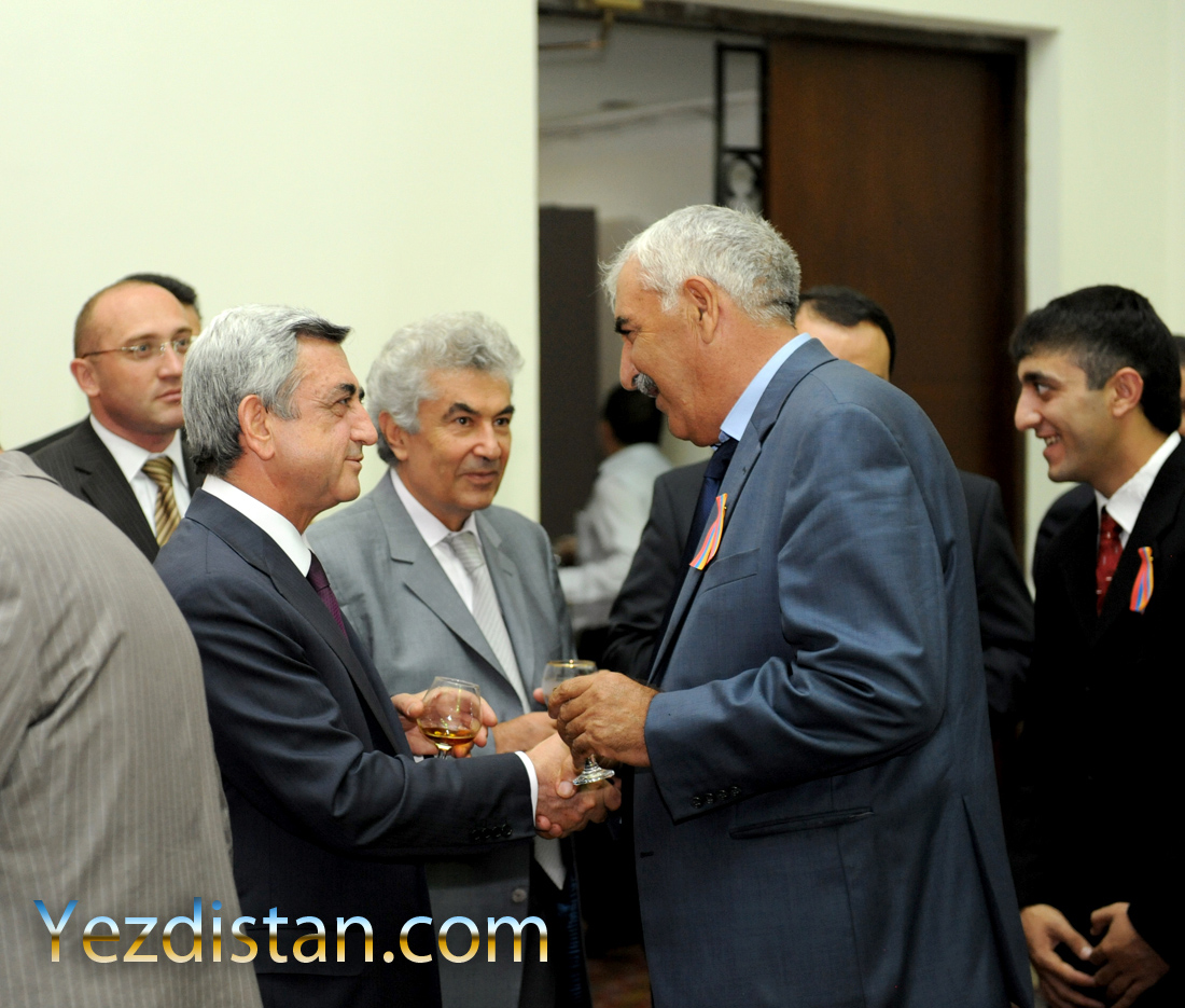 Հայաստանի Նախագահ՝ Սերժ Սարգսյան և Եզդիների ազգային միության նախագահ՝ Ազիզ Թամոյան